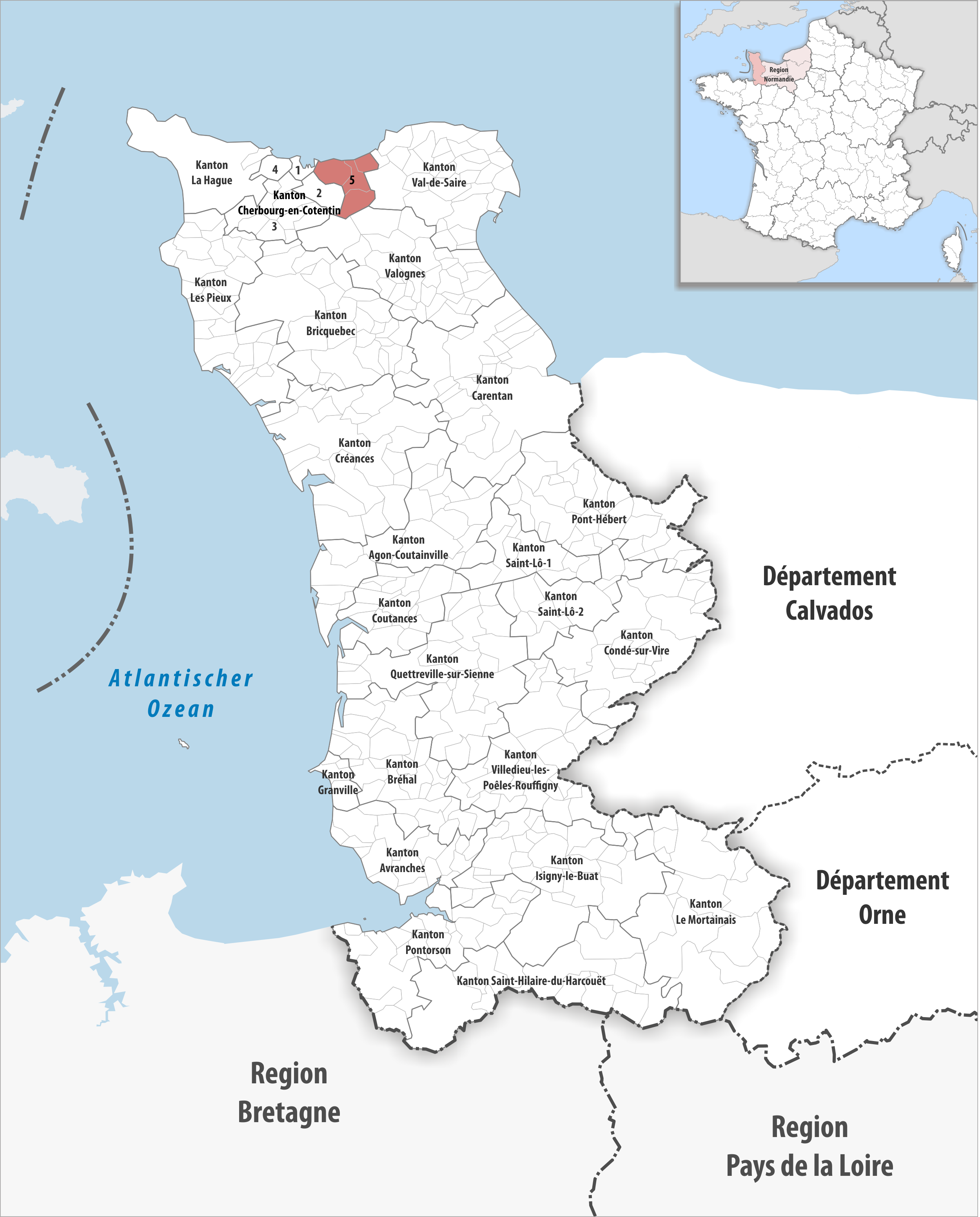 Lage des Kantons Tourlaville